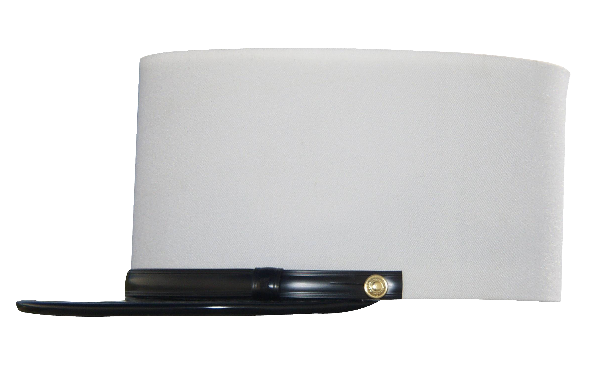 képi blanc de la Légion étrangère vu de profile